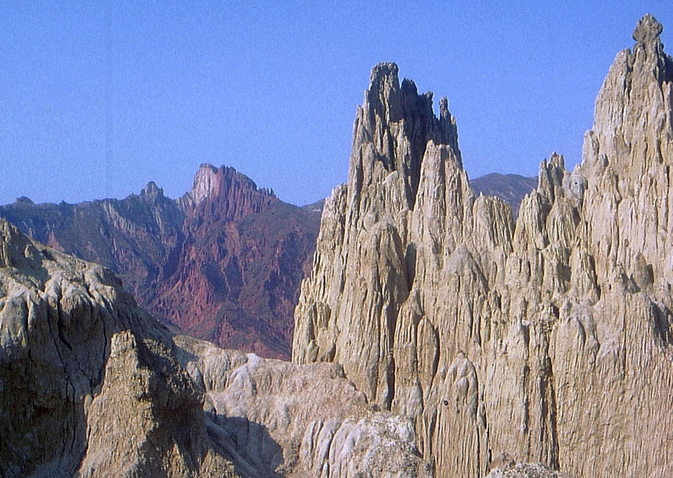 bizarre Formationen im Mondtal bei La Paz